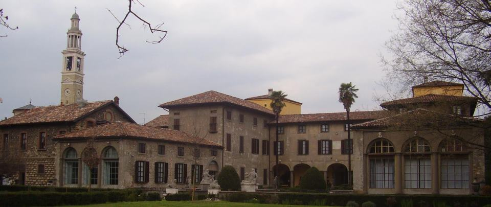 Вилла Амбивери, штаб квартира центра "Христианская Россия" в Сериате